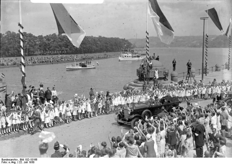 Der traurige Ausklang der Hindenburg-Reise in Koblenz a/Rh. Wenige Stunden vor der Trauerbotschaft. Der Herr Reichspräsident von Hindenburg, neben ihm sitzend der preussische Ministerpräsident Dr. Braun, bei ihrem Eintreffen am Deutschen Eck in Koblenz. Im Hintergrund der Rhein.